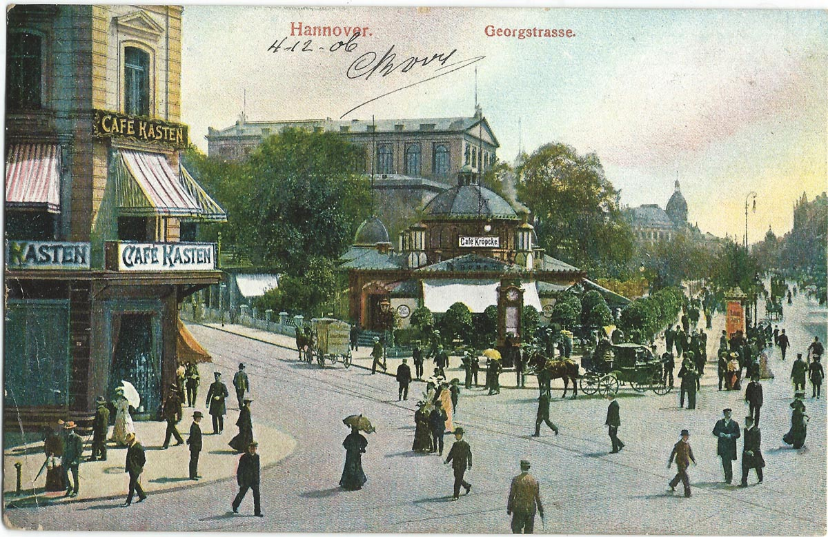 Vue de Hanovre au début du XXe siècle (carte postale).